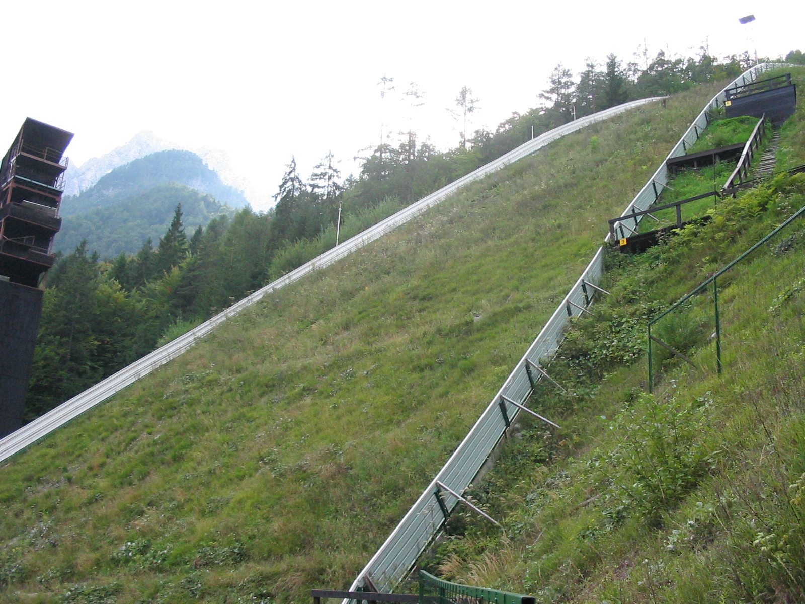 landing area, Planica, Slovenia